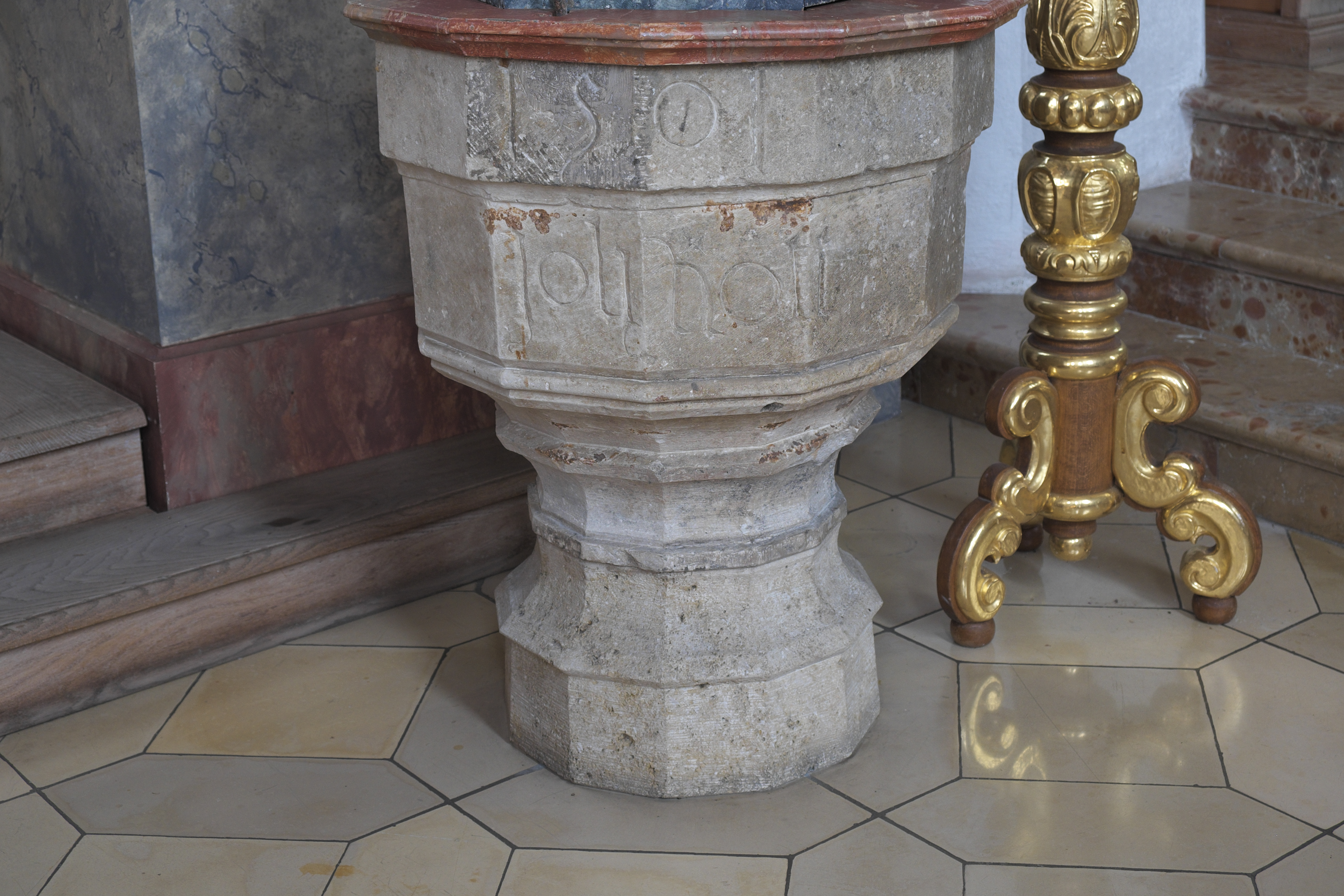 Katholische Pfarrkirche Johannes Baptist und Johannes Evangelist in Steinkirchen im Landkreis Erding (Bayern/Deutschland), Taufbecken mit der Jahrezahl 1501